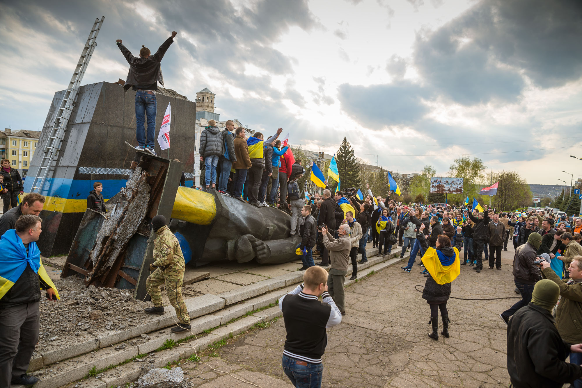 Пам'ятник В.І.Леніну, Краматорськ, м. Краматорськ, пл. Леніна.